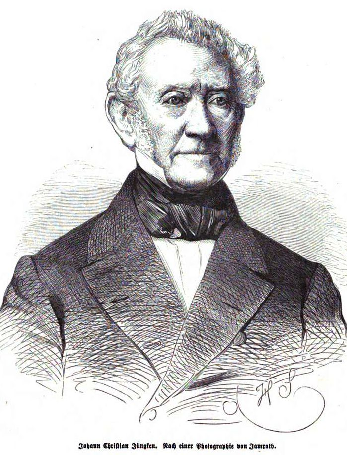 Johann Christian Jüngken, deutscher Mediziner im 19. Jh.